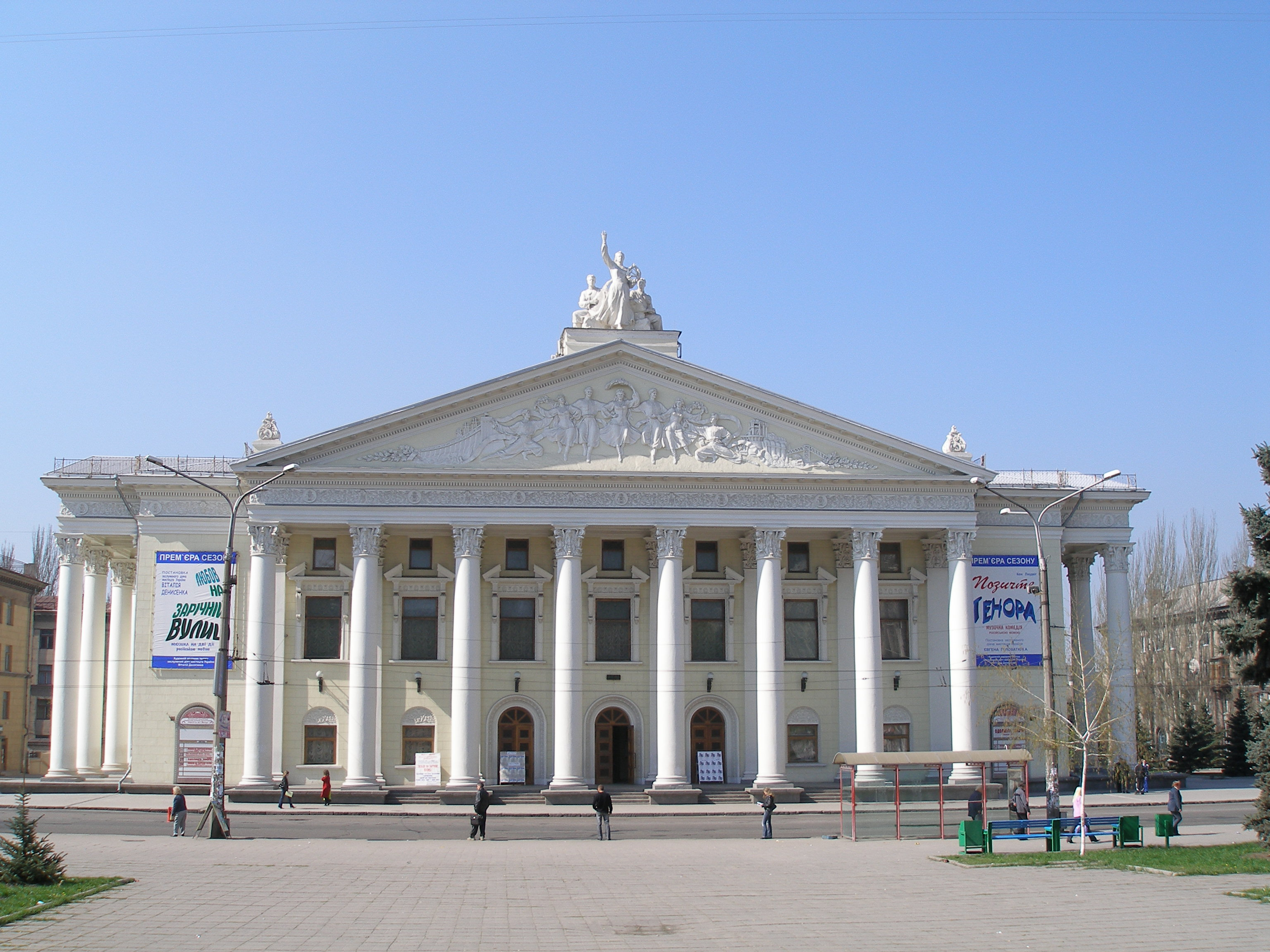 Обласний музично-драматичний театр ім. Магара, архітектор С. Фрідман, Запоріжжя, просп. Леніна, 41